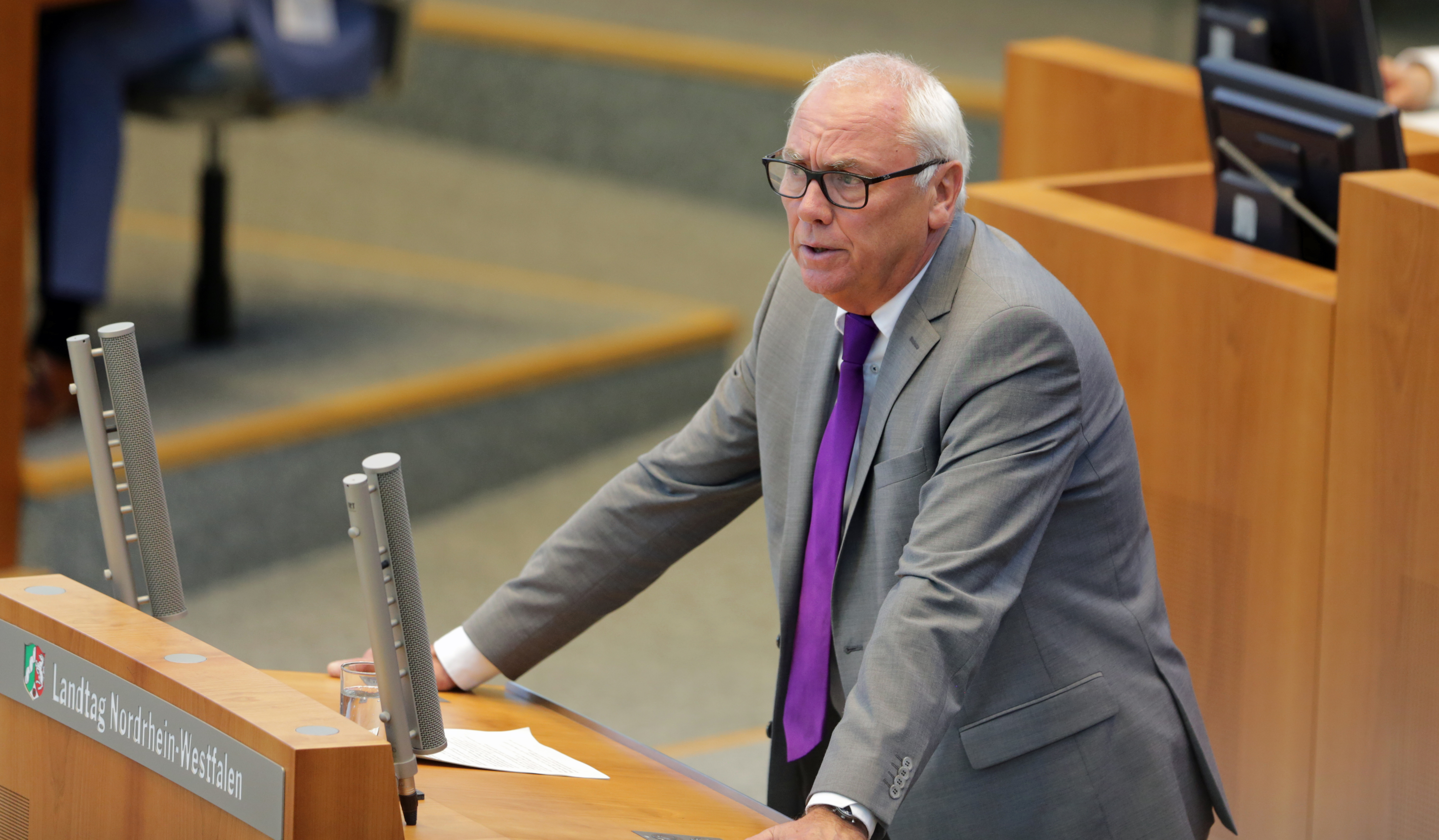 Preuß, Peter Rede im Plenum